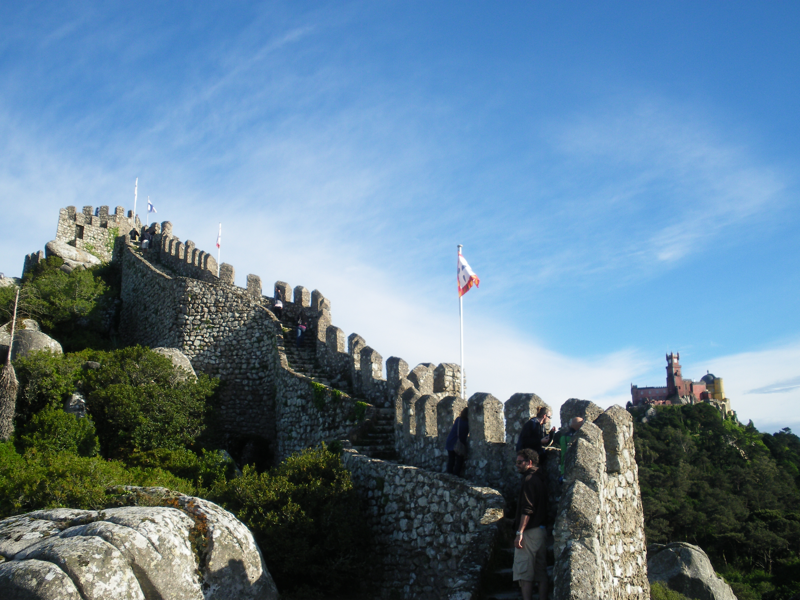 Castelo dos Mouros